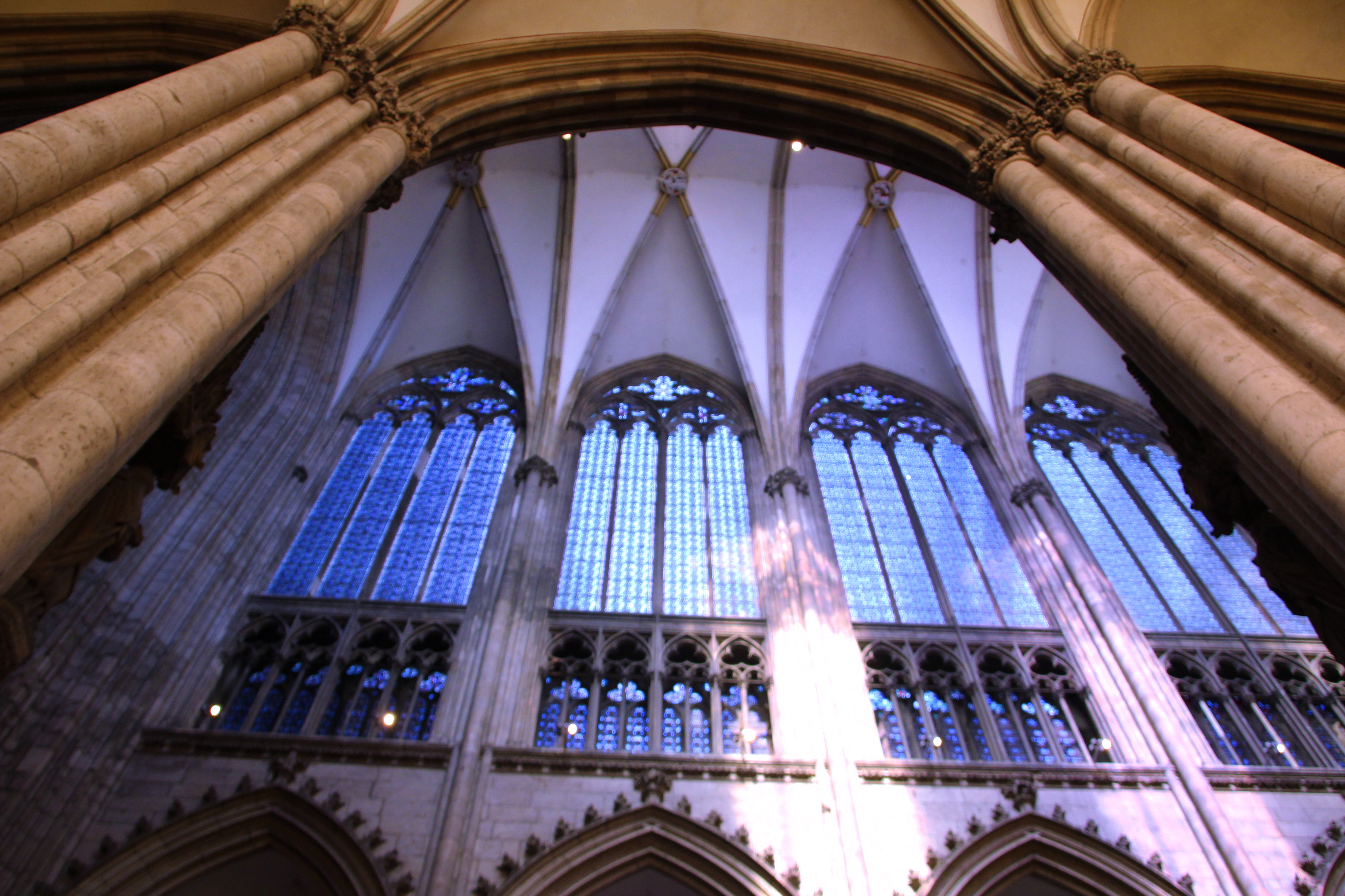 Hier zu sehen: Innenansicht des Kölner Doms.This is a photograph of an architectural monument., no. 911